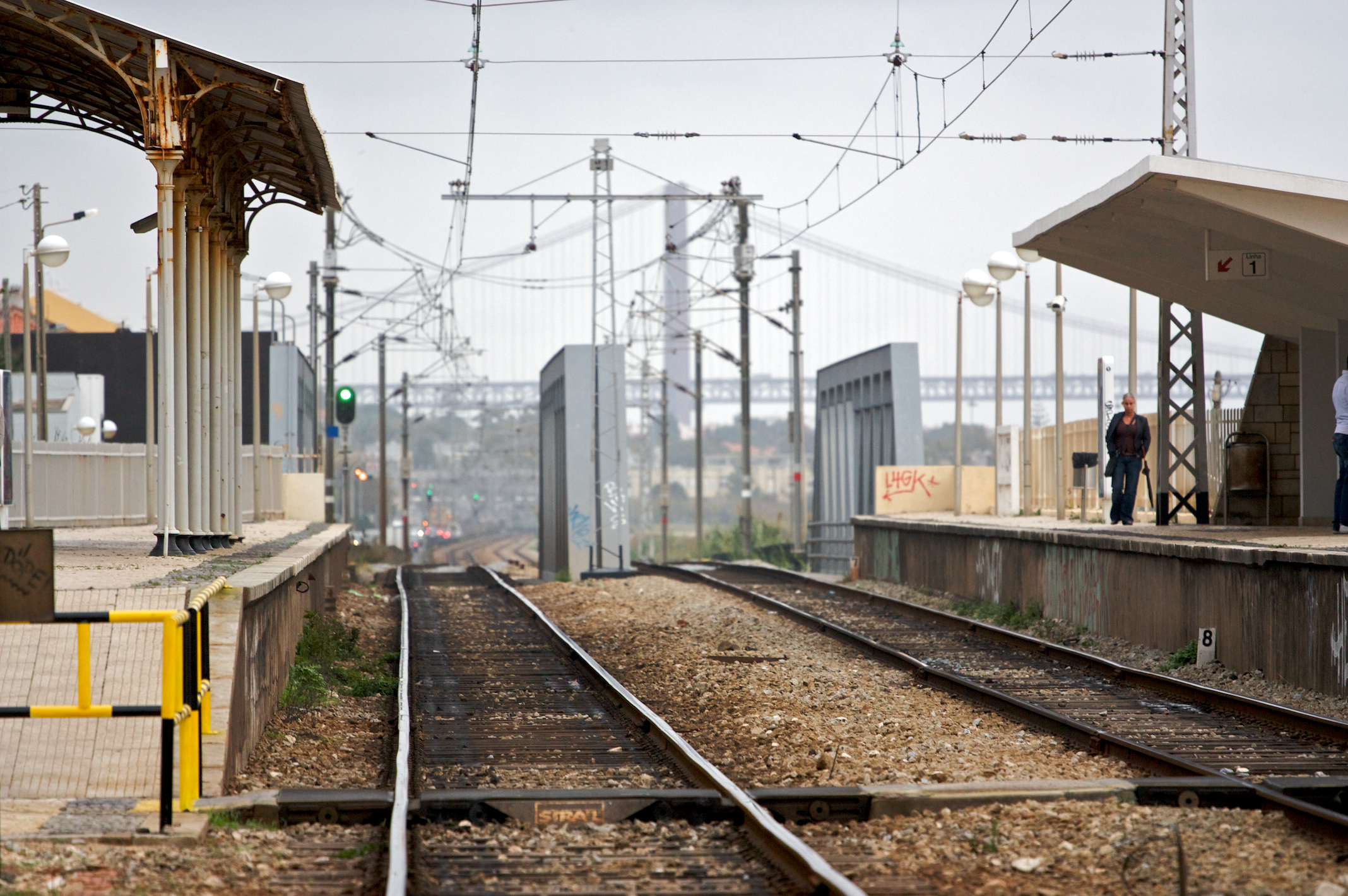 Tipo: A Apeadeiro Local: Cruz Quebrada Linha de Cascais, PK 9 Data e hora: 13 de Novembro de 2009 16h56